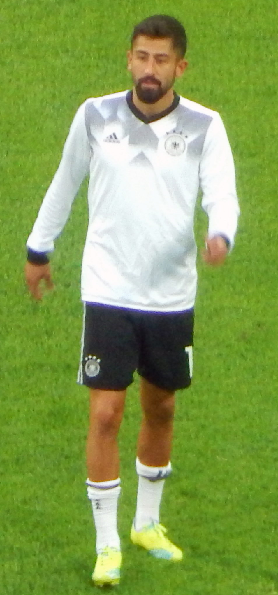 Финал Кубка конфедераций 2017